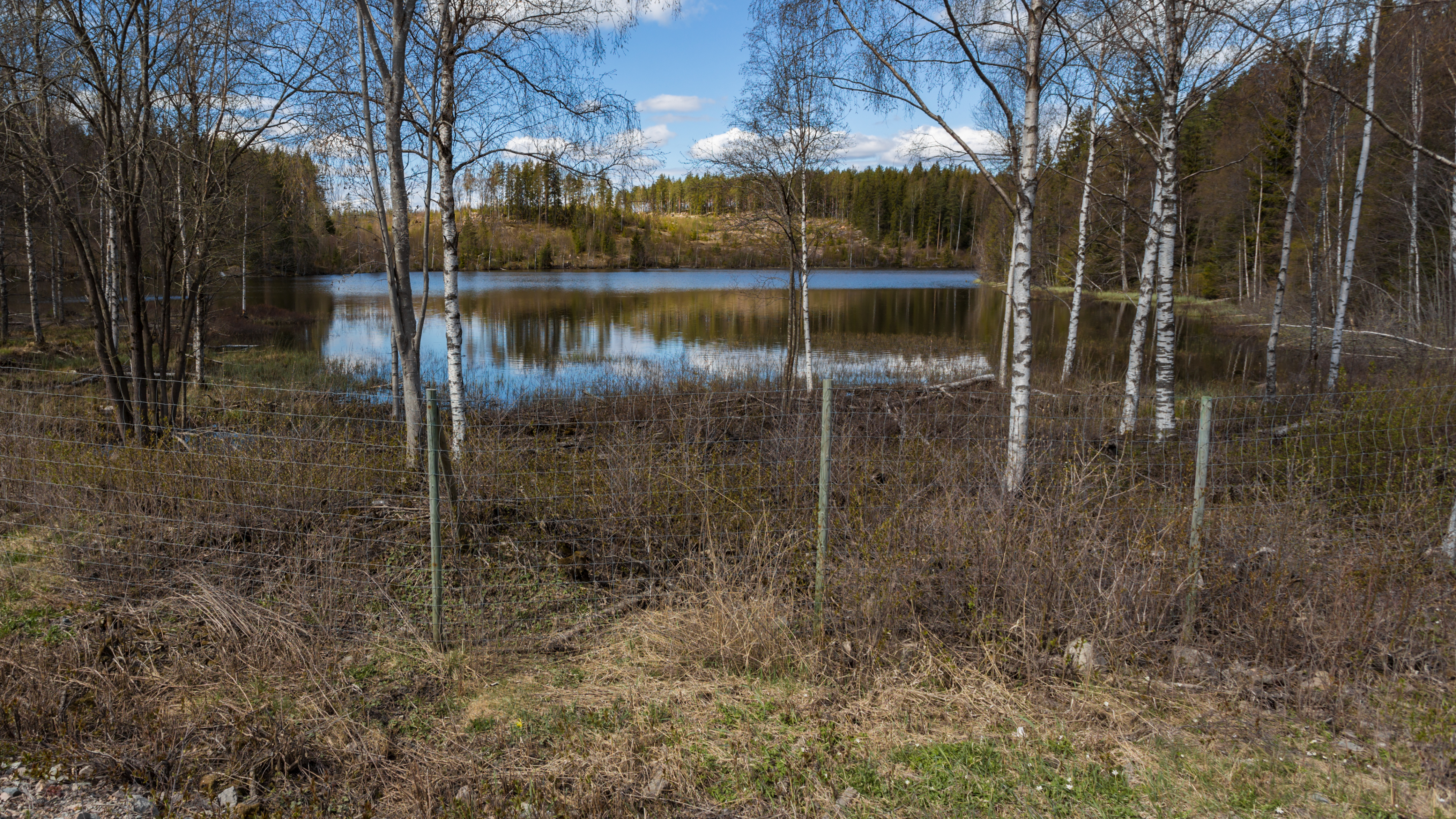 Dammsjön, Norbergs kommun, Västmanlands län, Sverige. Sedd från riksväg 68, därav viltstängslet.